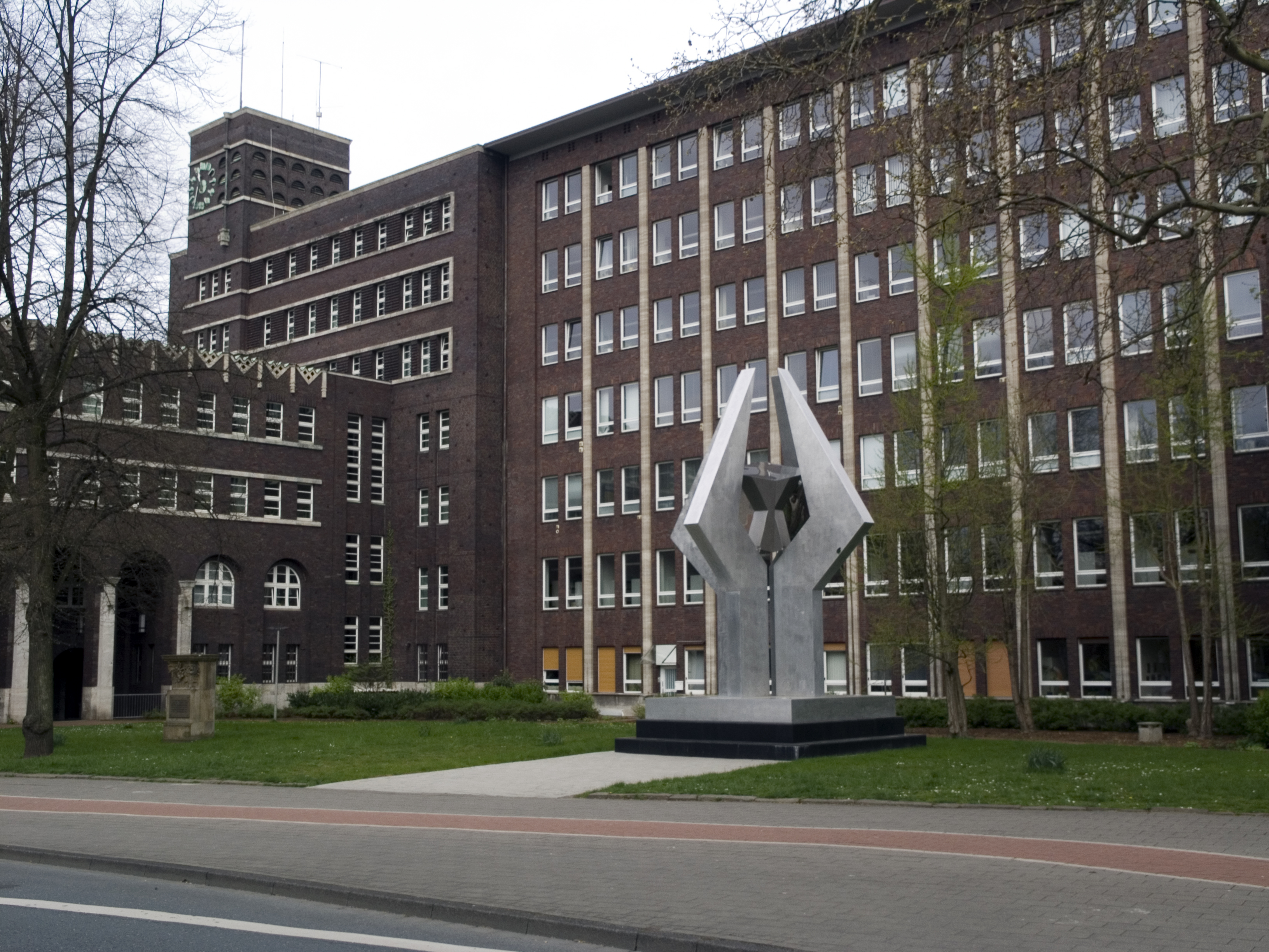 Северный Рейн - Вестфалия, Оберхаузен. Ратуша